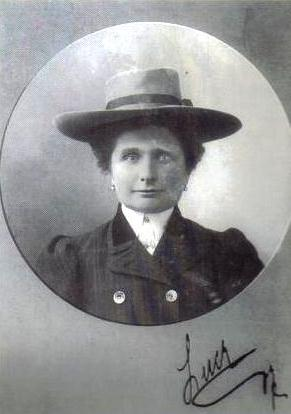 Lucy Christalnigg (1872-1914)